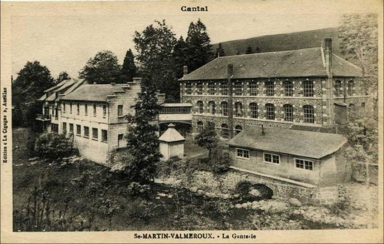 Photo usine Isotoner - Saint Martin Valmeroux